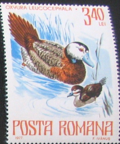 Source: Post of Romania